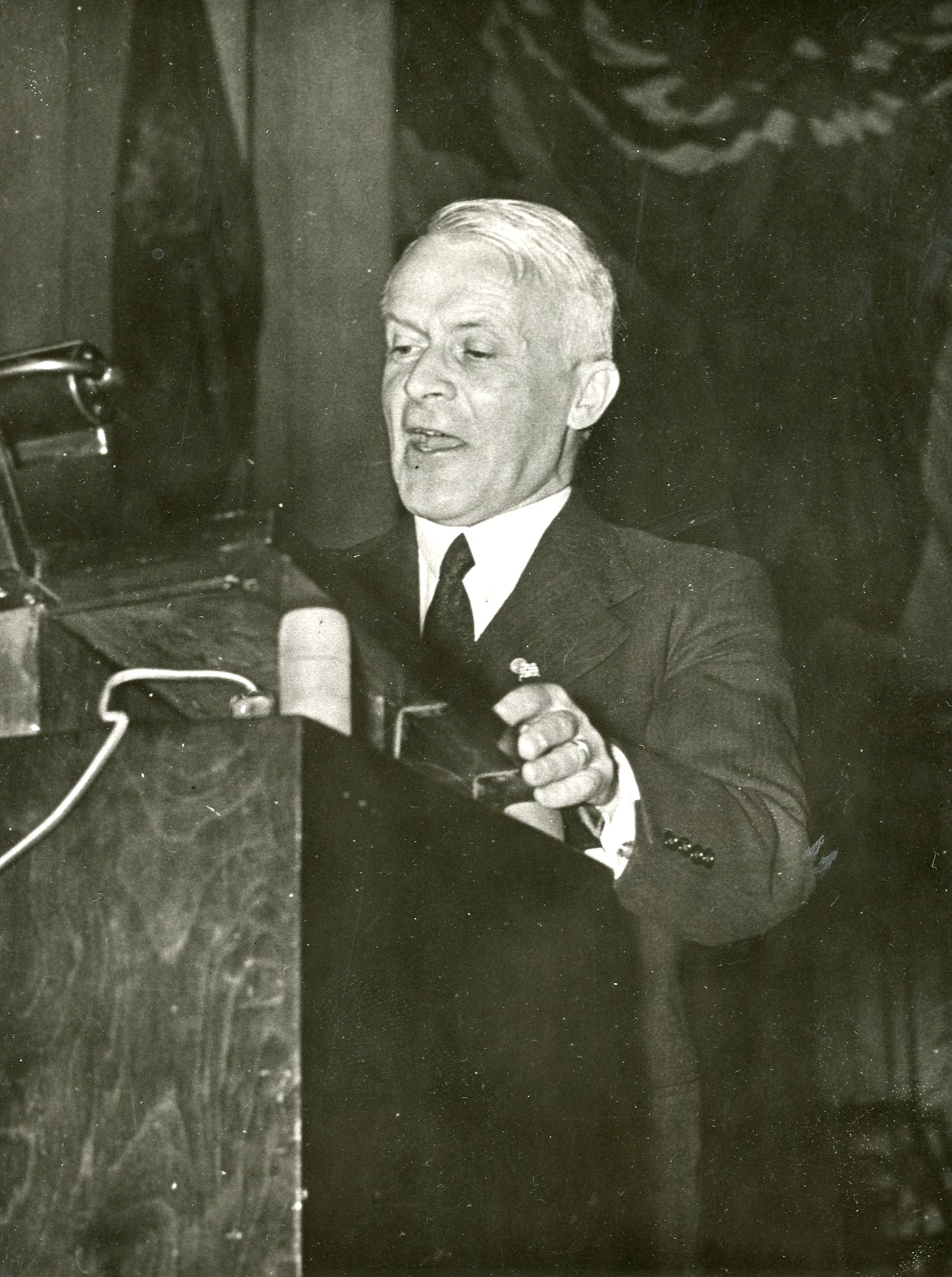 Fredrik Paasche. RA/PA-1209/Uc/66/4/L 3782